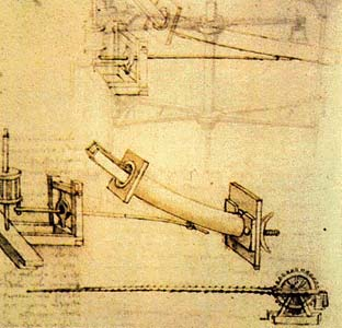 рисунок Леонардо да Винчи - Сепаратор муки